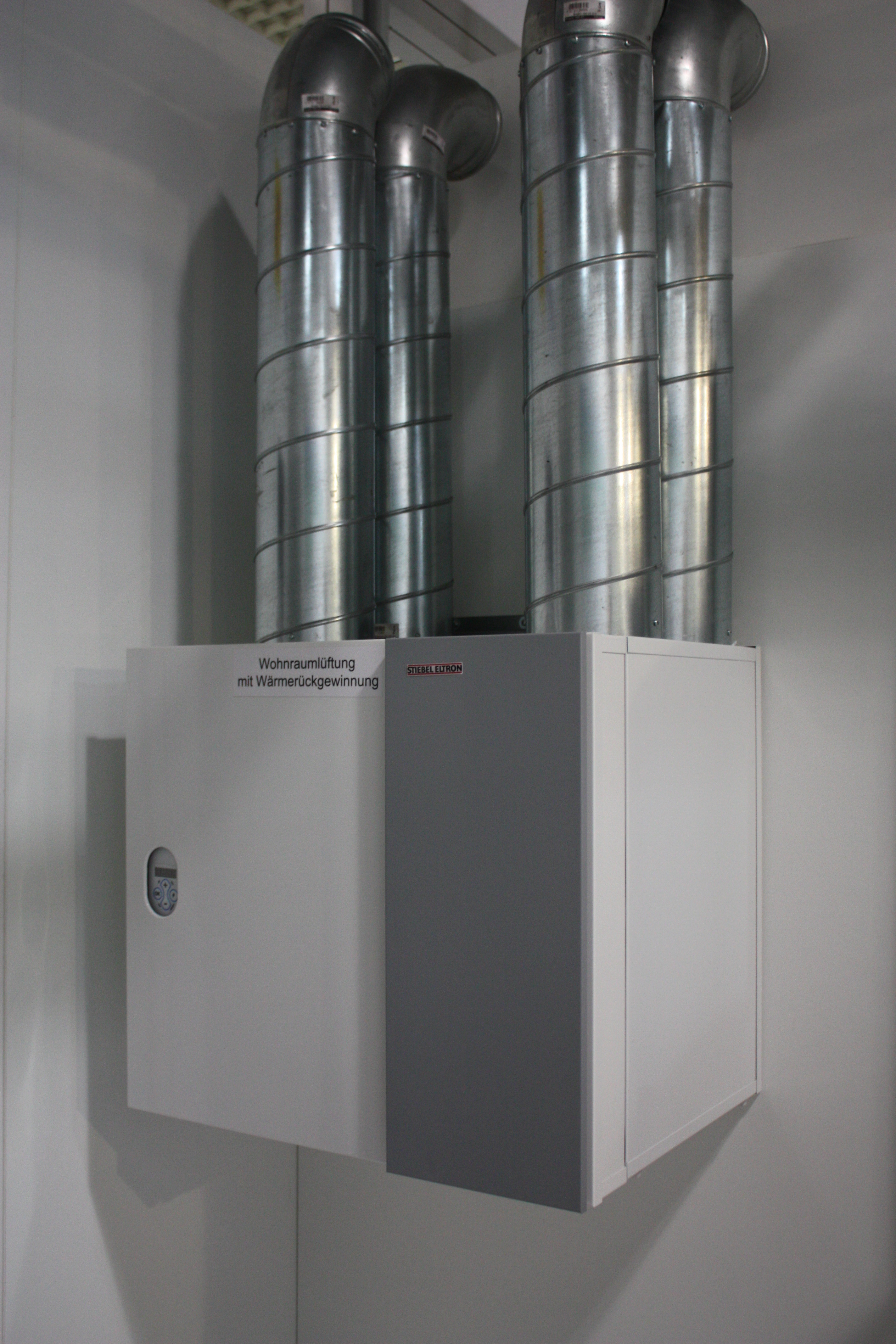 IFA 2010, Berlin; Wohnraumlüftung mit Wärmerückgewinnung